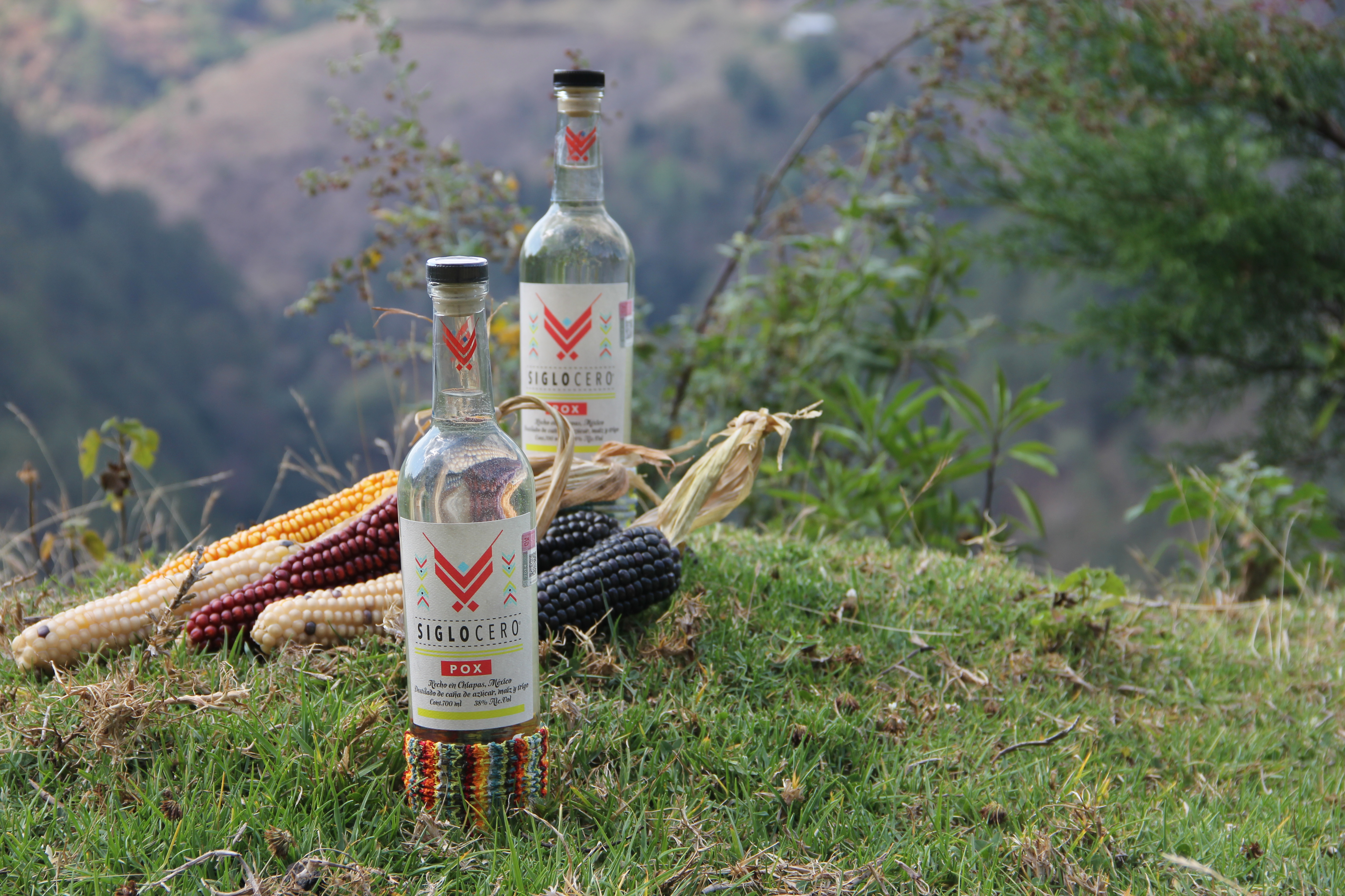 El pox es un destilado de caña de azúcar, maíz y trigo.